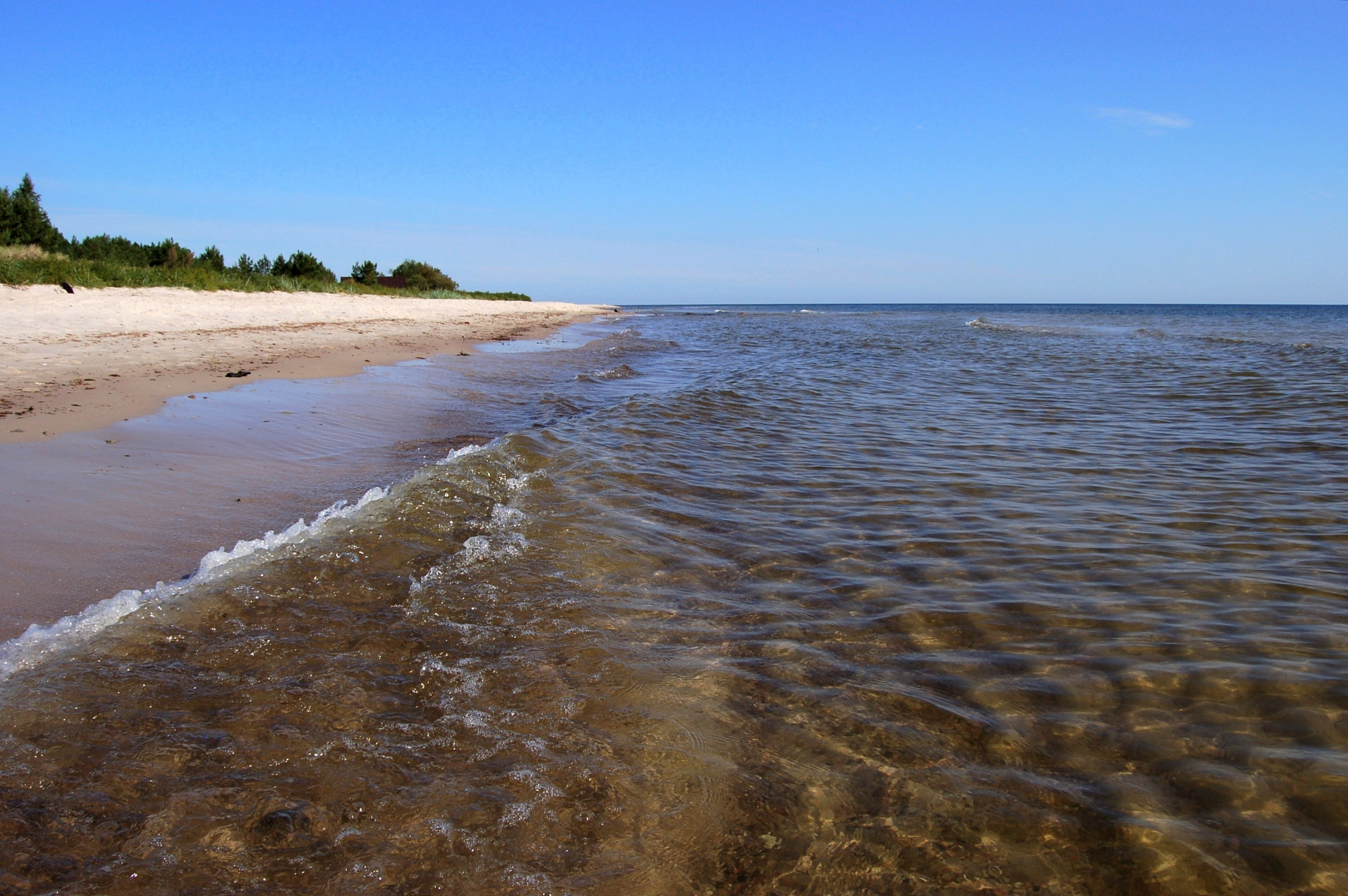 Limo rand